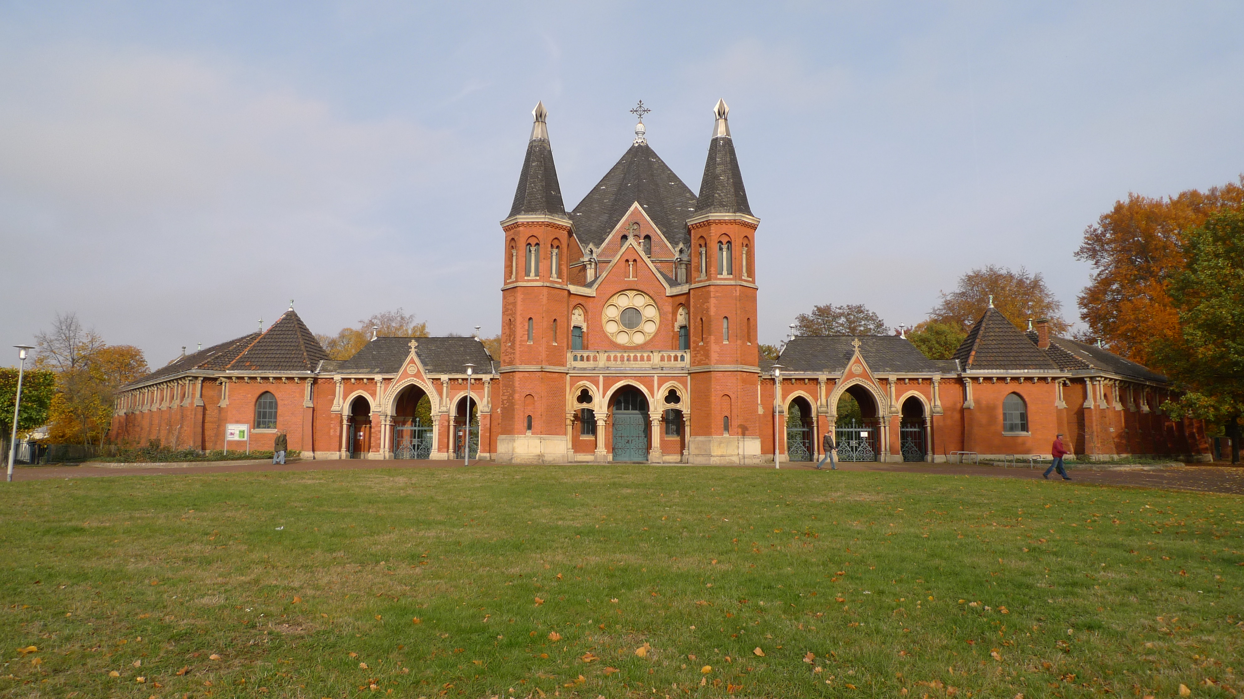 Haupteingang des Stöckener Friedhofs in Hannover